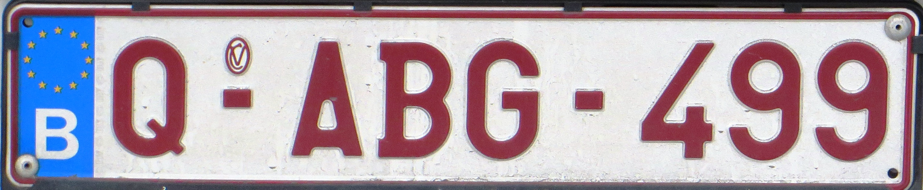 Trailer plaat